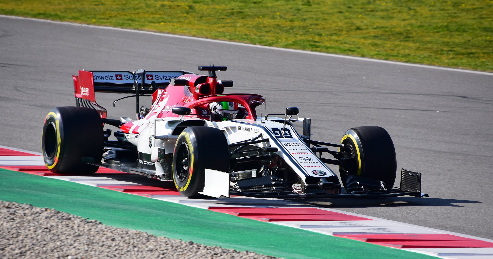 FORMULA ONE TEST DAYS 2019 / Circuit de Barcelona